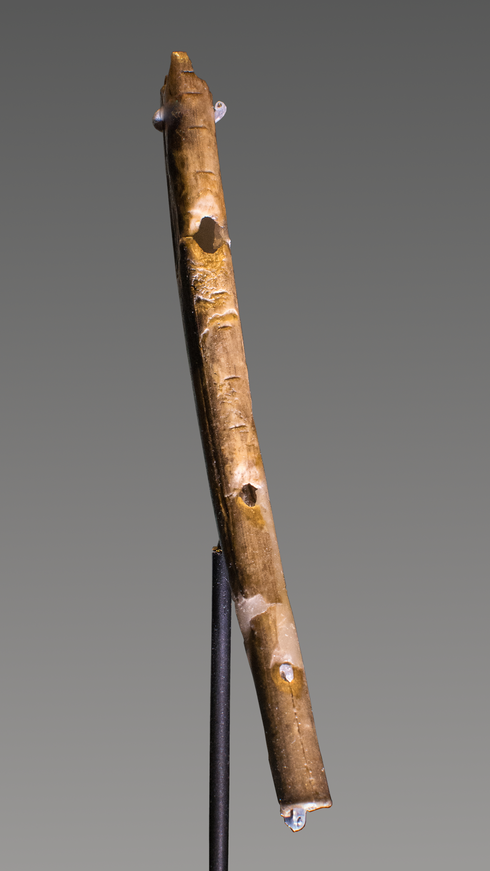 Flöte aus dem Abri Geißenklösterle bei Blaubeuren.